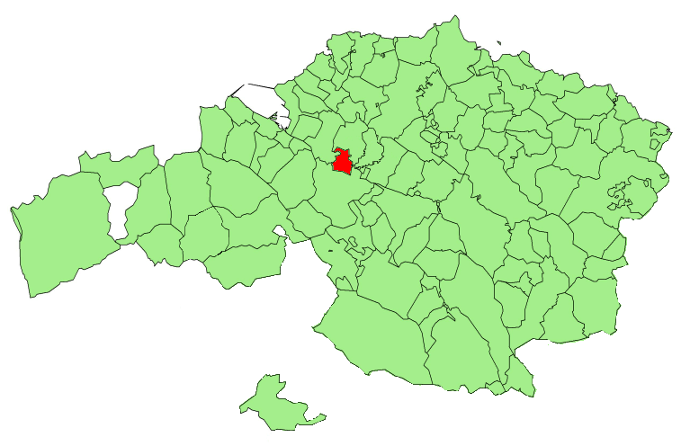 Sondikako udalerriaren mapa